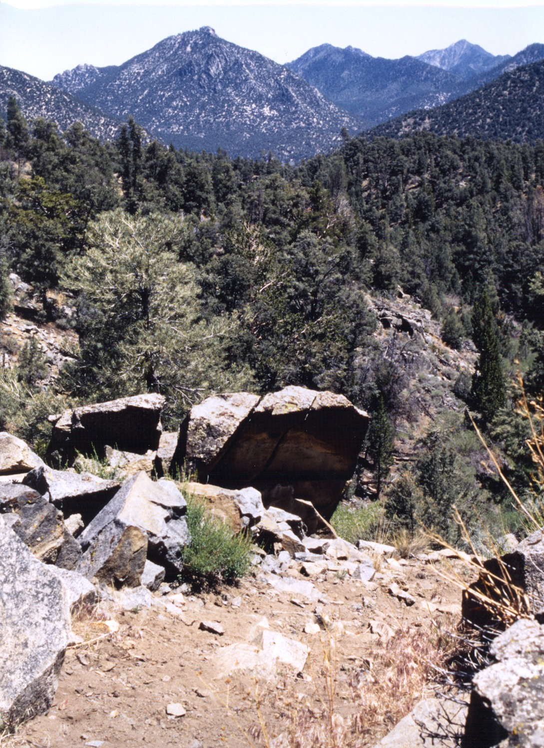 Owens Peak Wilderness, CA USA